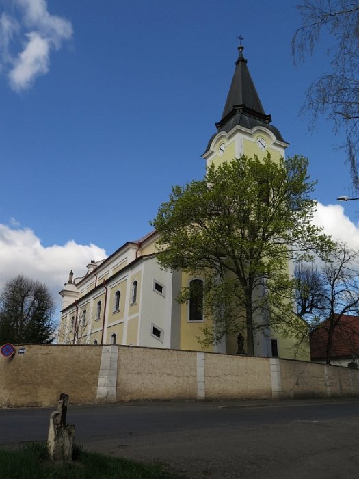 Kostel Všech svatých, Libochovice.